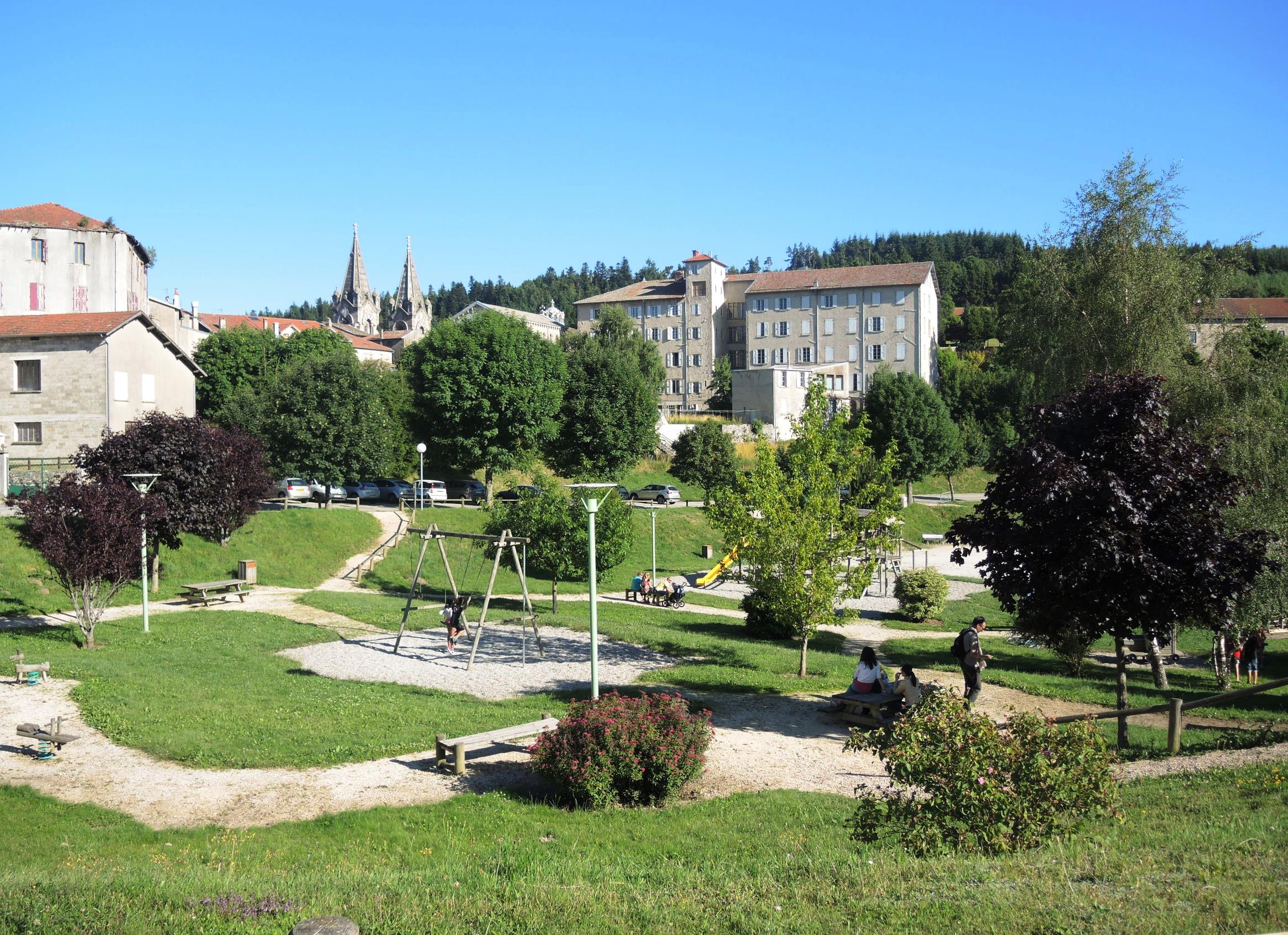 Lalouvesc jardin public